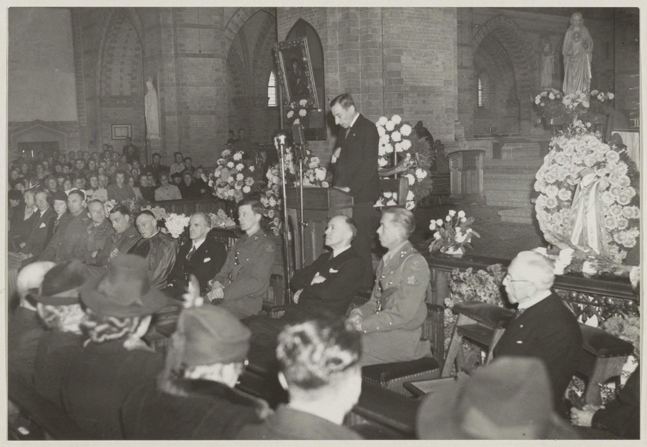 CollectieCollectie Fotoburo de BoerInventarisnummerNL-HlmNHA_54007867BeschrijvingJan de Quay spreekt in de Kathedraal St. Bavo tijdens de herdenking een jaar na dato van de gefusilleerden op de Westergracht.FotonummerNL-HlmNHA_1478_3944DocumenttypeHistorieprenten, tekeningen en foto'sVervaardigerBoer, Cees de (1918-1985) Soort vervaardigerFotograaf PersonenQuay, Dr. J.E. de (1901-1985) Functies personenpoliticus LandNederland ProvincieNoord-Holland GemeenteHaarlem PlaatsHaarlem StraatLeidsevaart Begindatum26-10-1945Einddatum26-10-1945Datering gebeurtenis26-10-1945TechniekFoto Trefwoordentweede wereldoorlog, herdenkingen